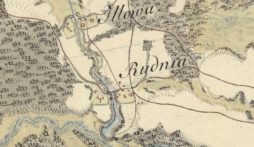 Iłowa i Rudnia na mapie Galicji Zachodniej (Josephinische Landesaufnahme 1801-1804)